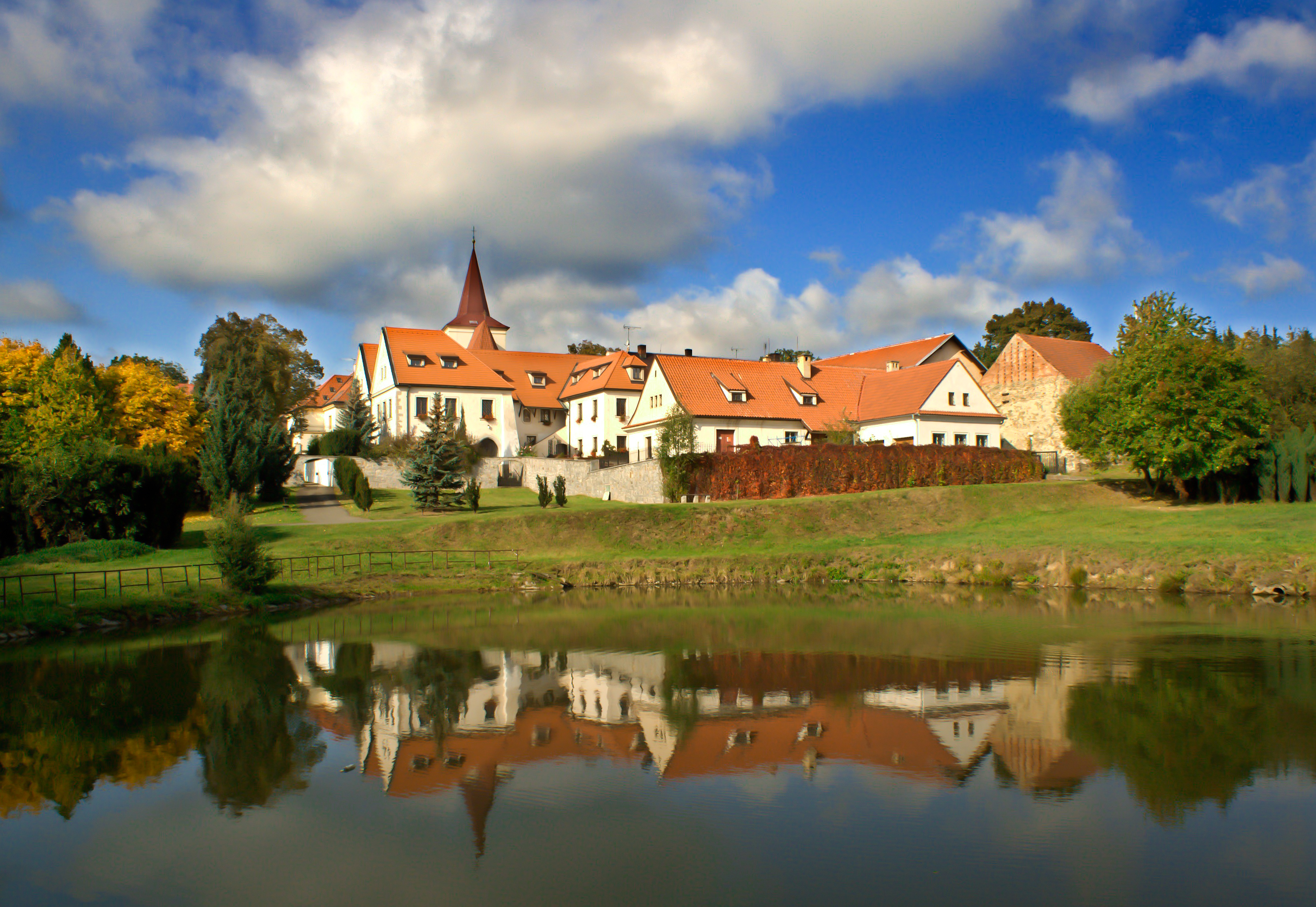 Regionální muzeum v Jílovém u Prahy - venkovní pohled